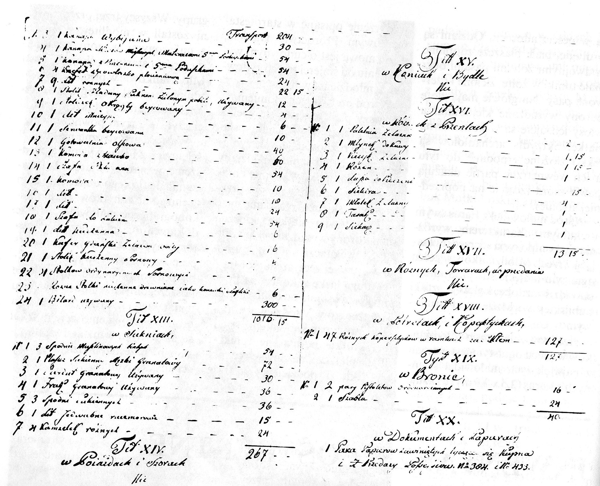 Inwentarz pośmiertny Henryka Knautego z 1830r. (Warszawa).